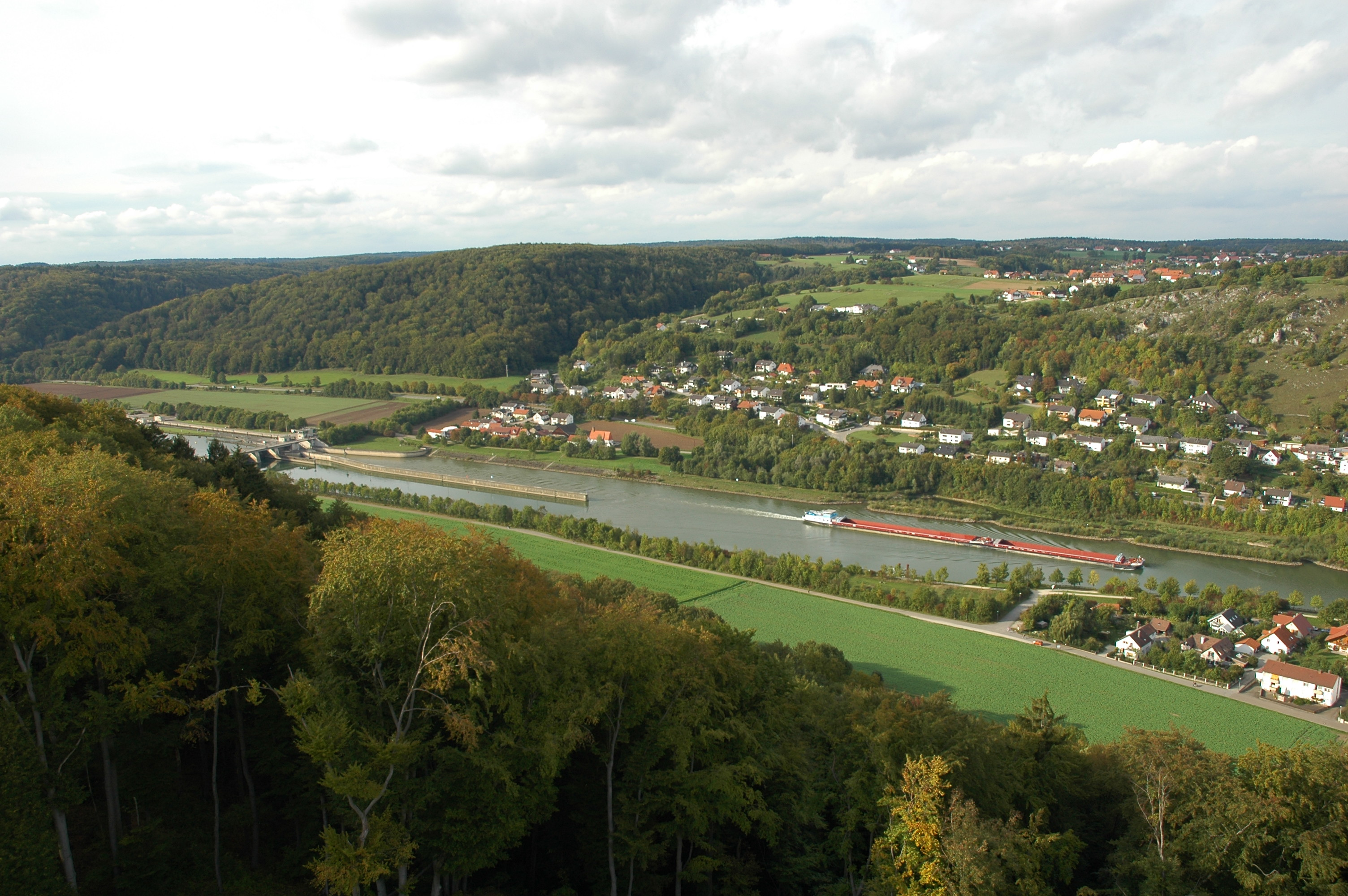 Altmühl bei Kelheim, Blick von der Befreiungshalle